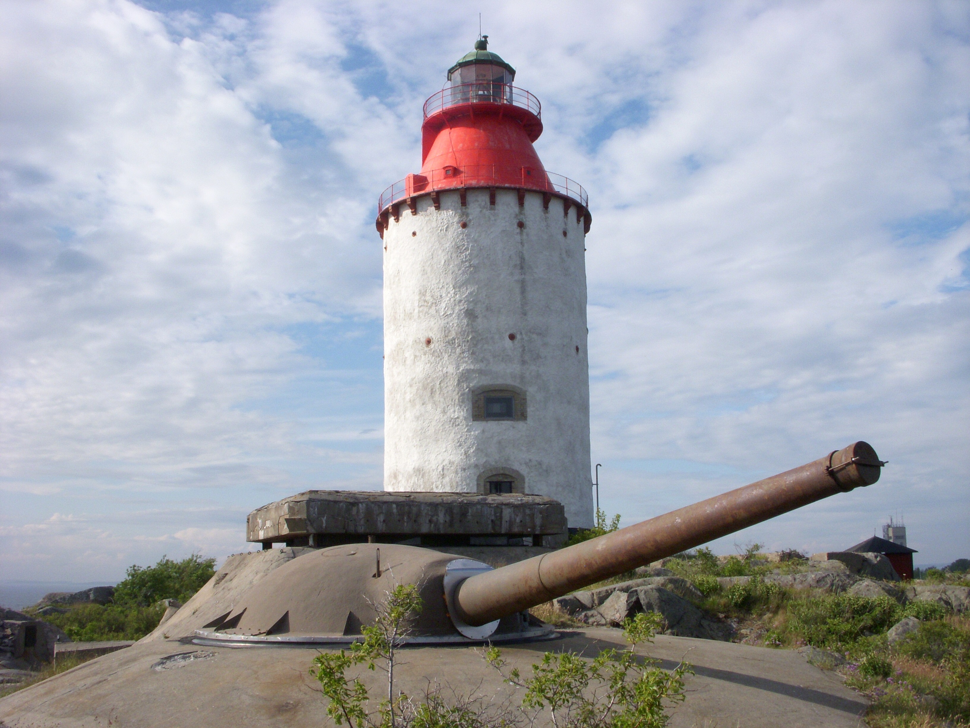 Lansorts fyr och kustartilleriställning från 1940-talet